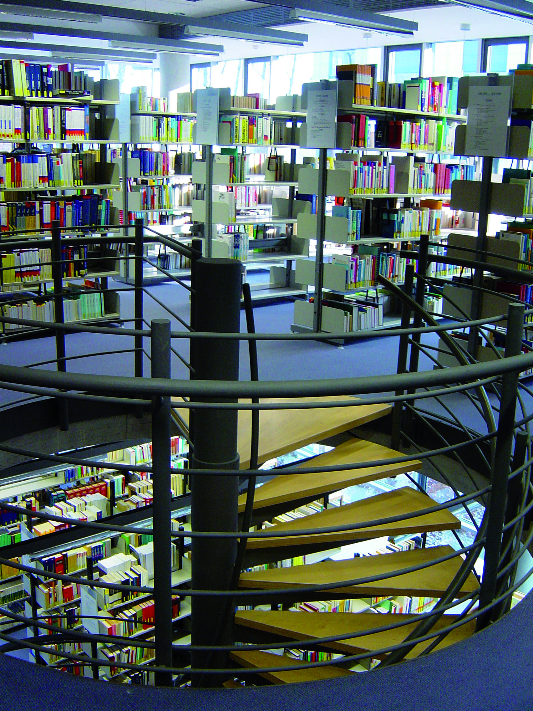 Teilbibliothek